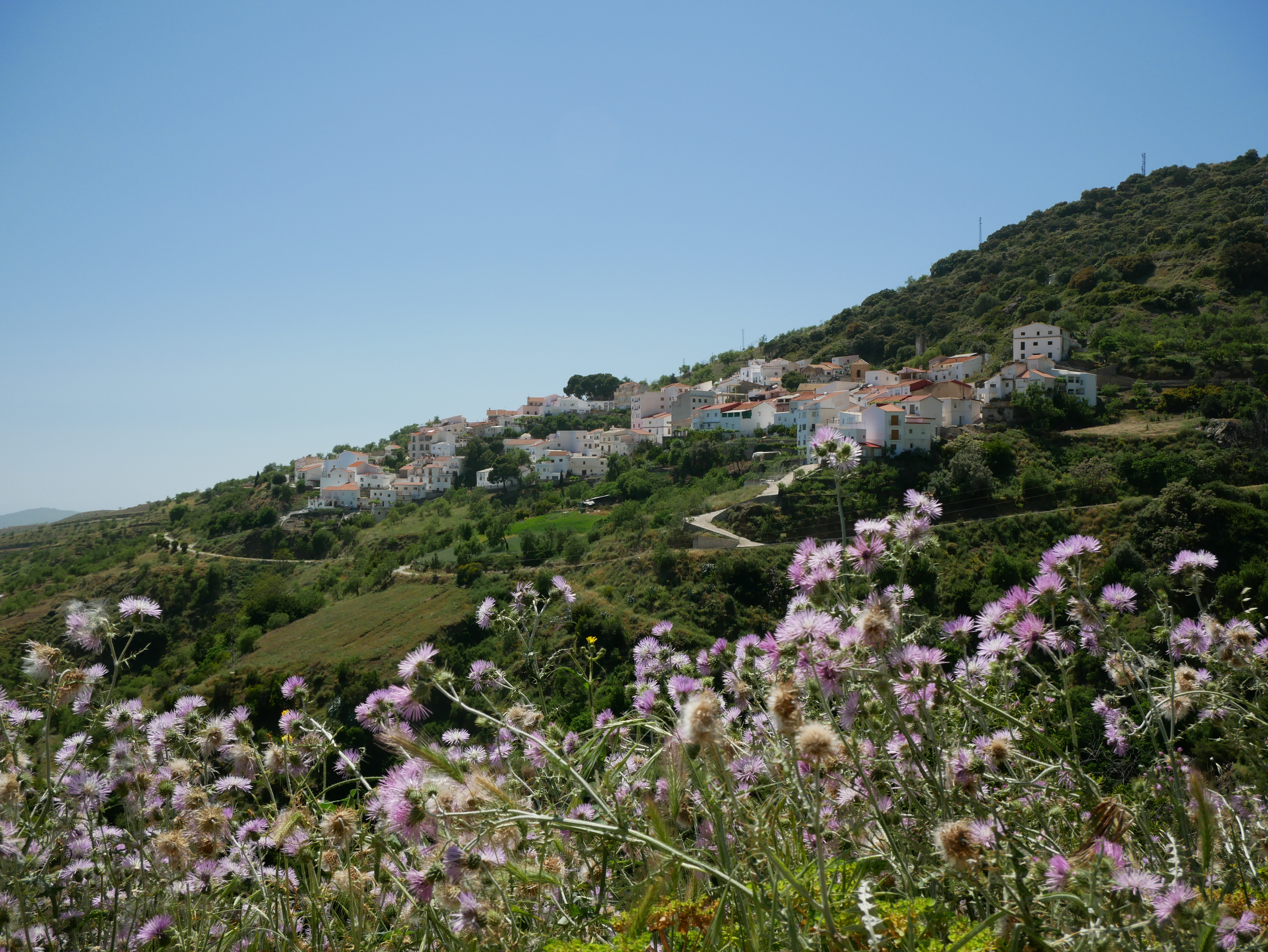 Polopos, locatie van het RTL4 TV programma 'Het Spaanse Dorp: Polopos', gelegen in de provincie Granada in het Contraviesa gebergte aan de Costa Tropical in Spanje